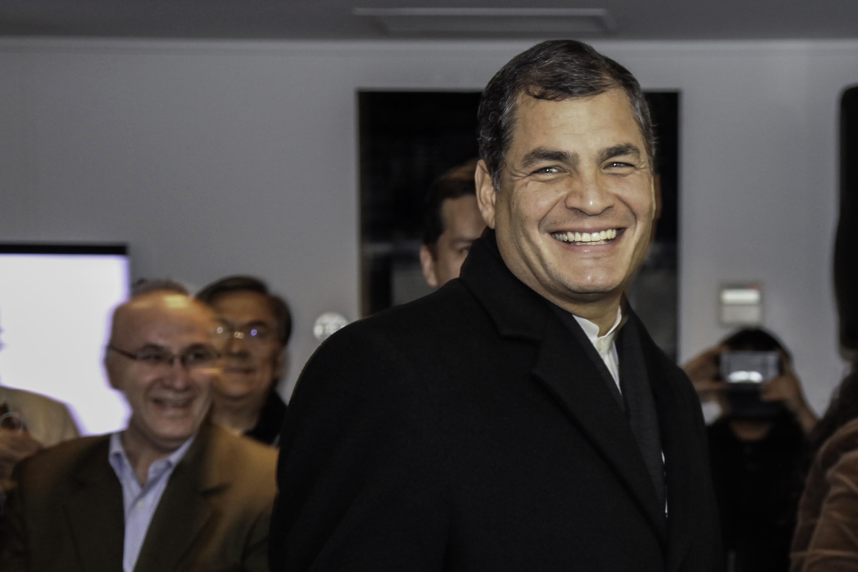 Paris (Francia), 05 de noviembre 2013. Esta noche arribó al Aeropuerto Le Bourget el Presidente del Ecuador, Rafael Correa. Fue recibido por el Canciller Ricardo Patiño.